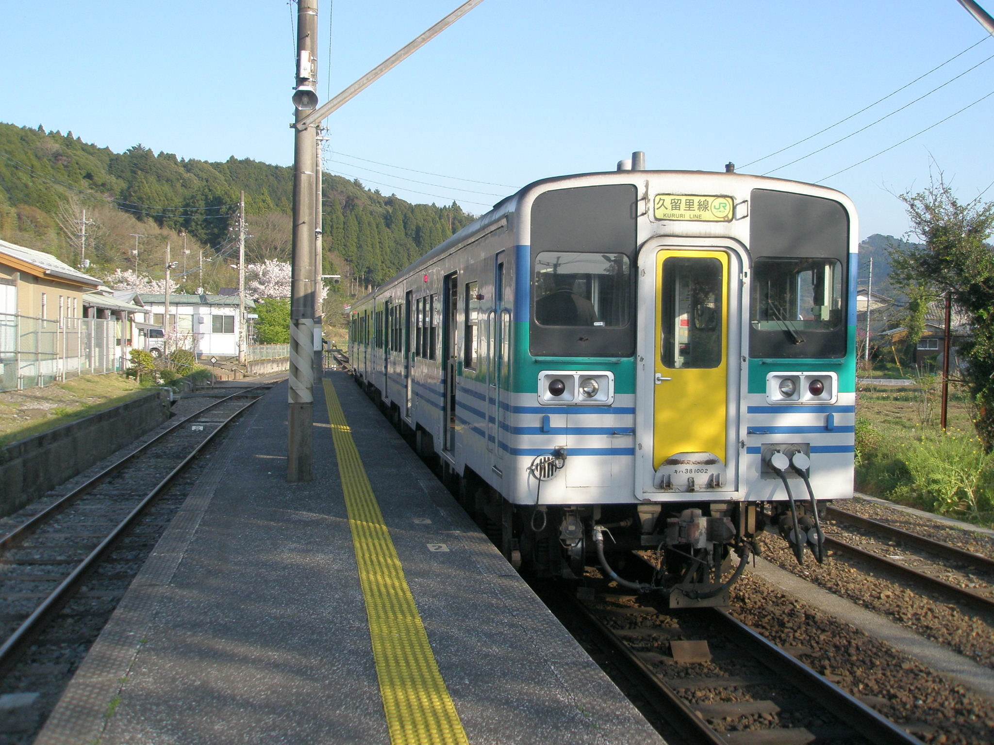 上総亀山駅に停車したキハ38形